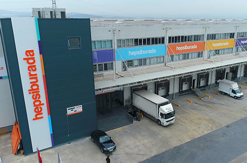 Hepsiburada Gebze Operasyon Merkezi (2020)